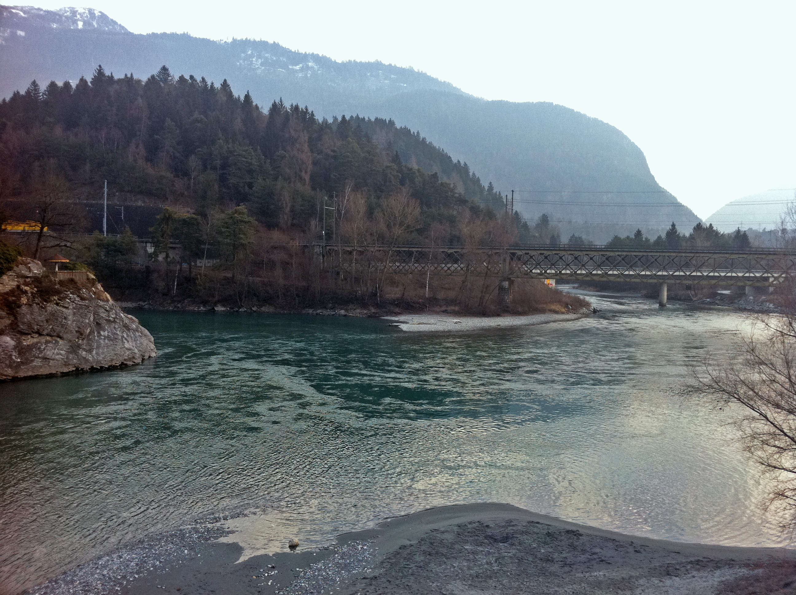 Zusammenfluss von Vorderrhein (vorne) und Hinterrhein (hinten) zum Alpenrhein (nach links) bei Reichenau